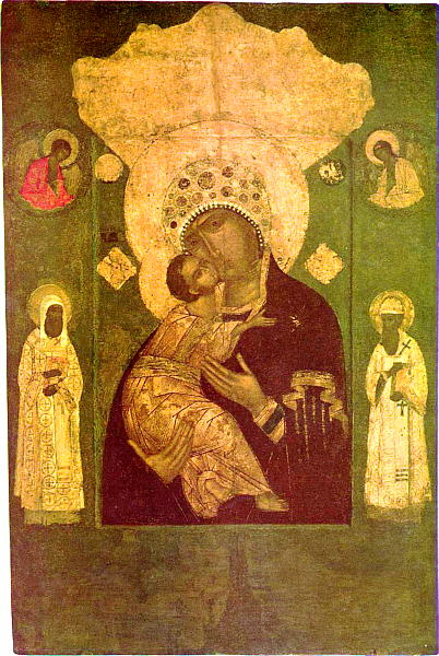 Икона Богородицы Волоколамская Владимирская